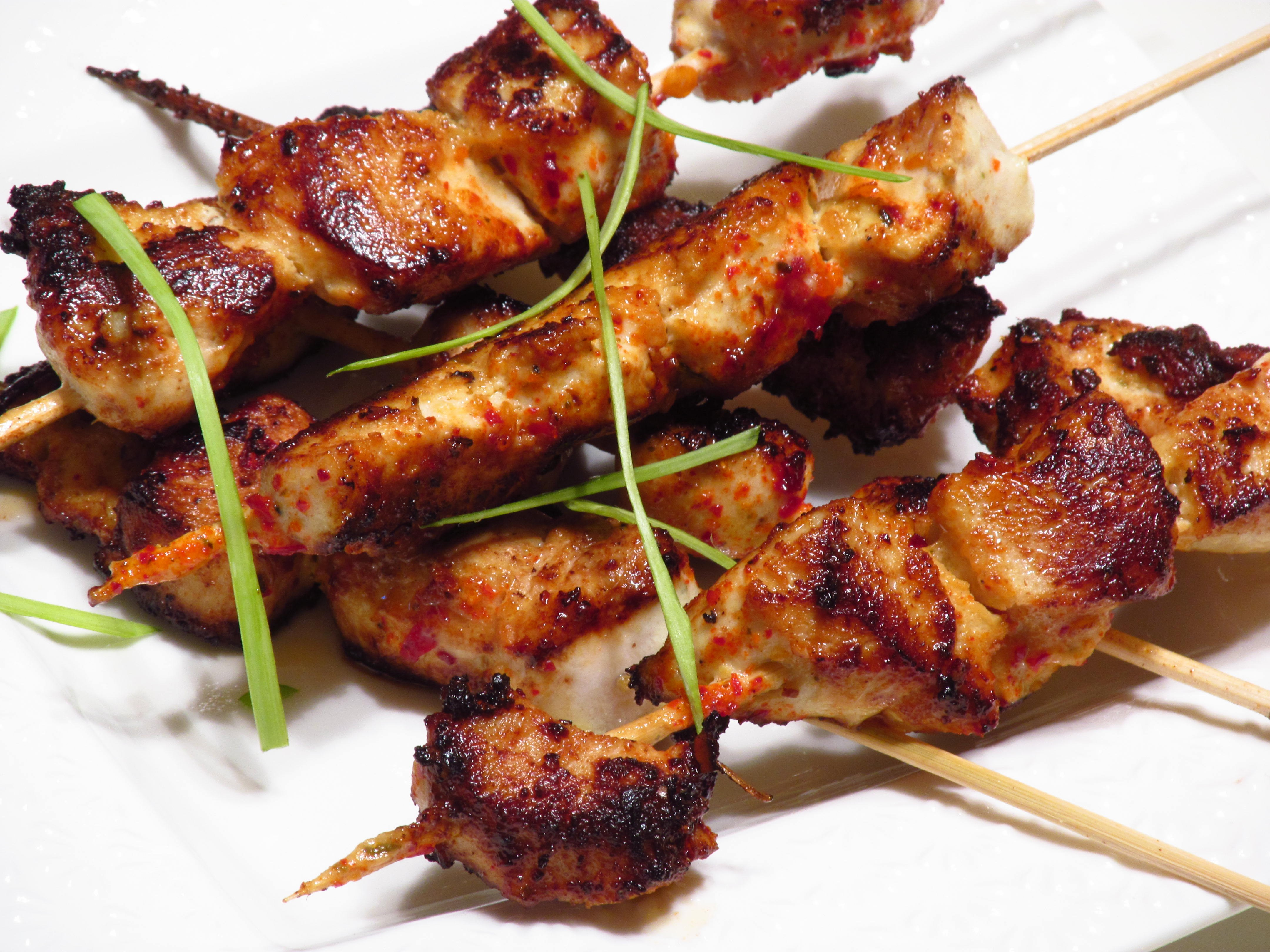 pilecin raznjici New